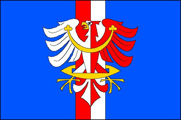 Vlajka obce Horní Radechová